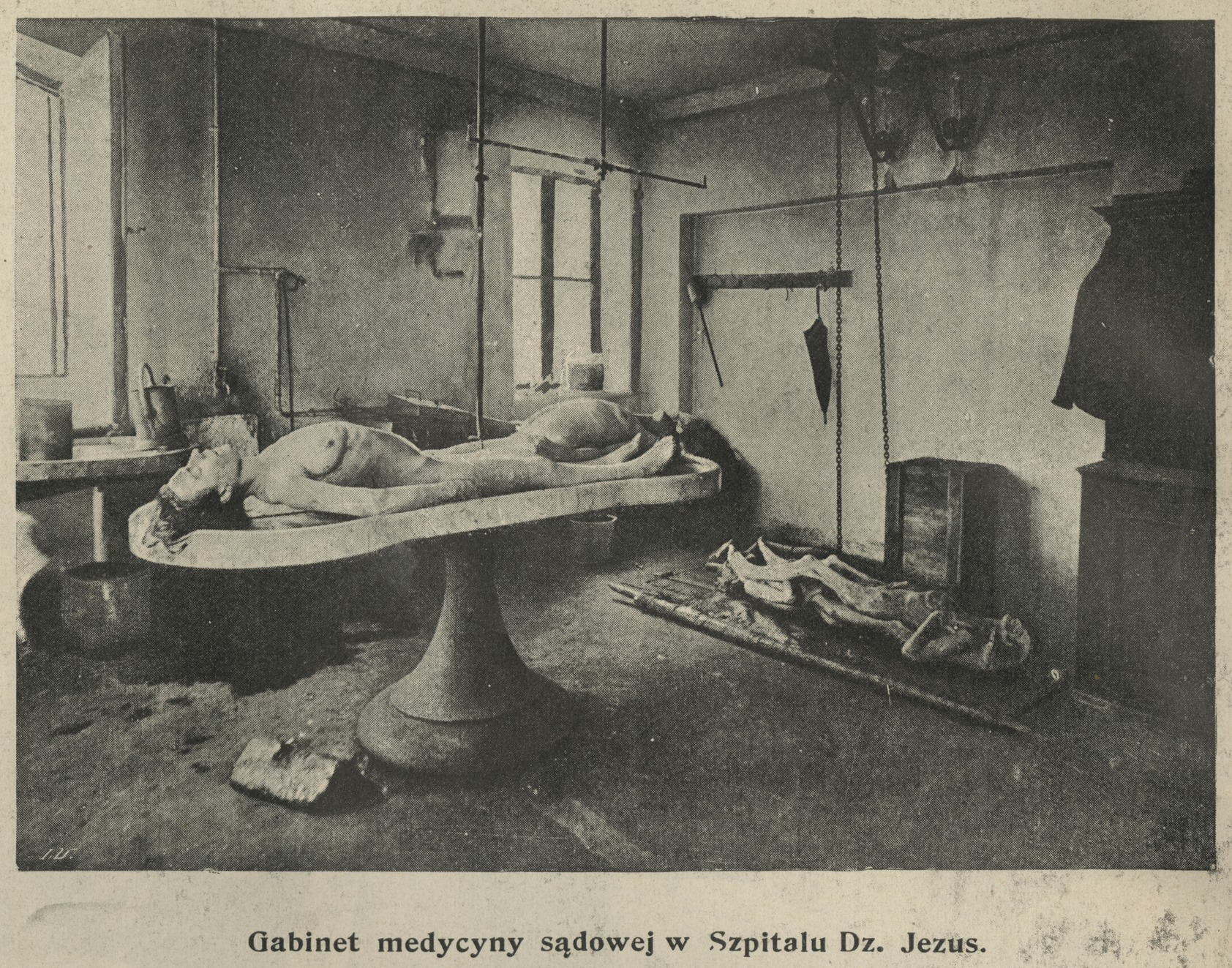 Gabinet medycyny sądowej w Szpitalu Dzieciątka Jezus